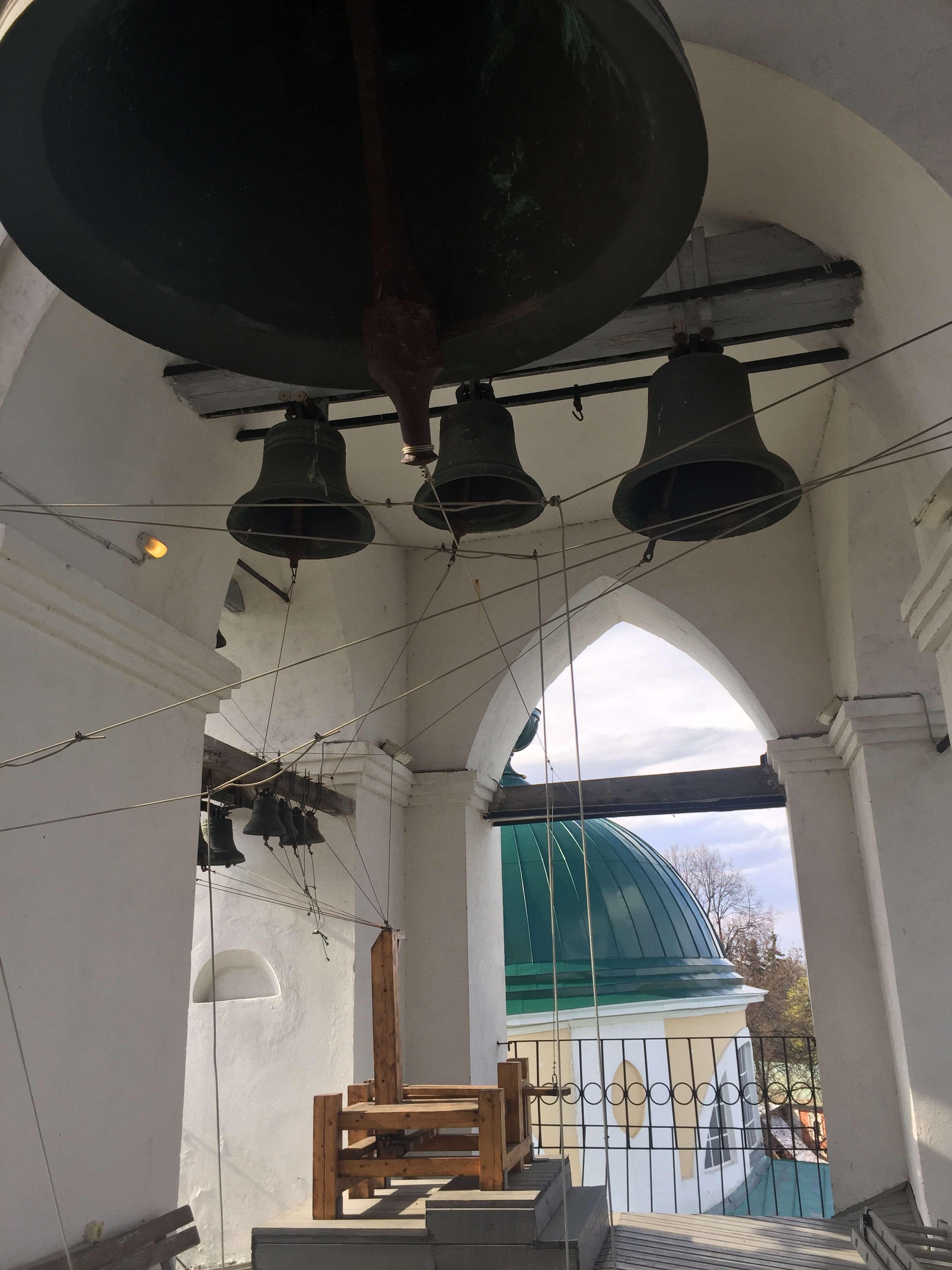 Звонница Ярославского Кремля